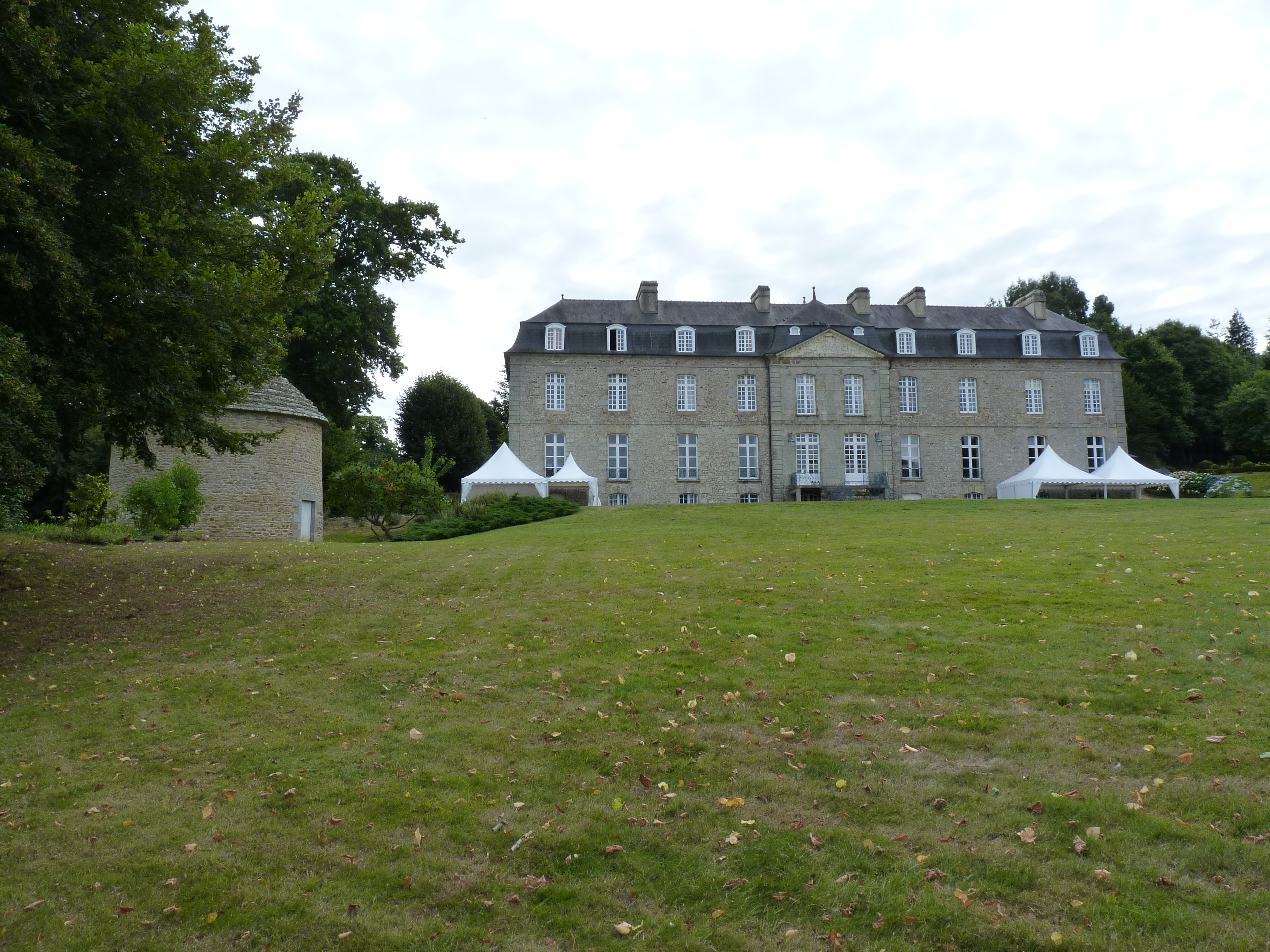 Château du 18ème siècle